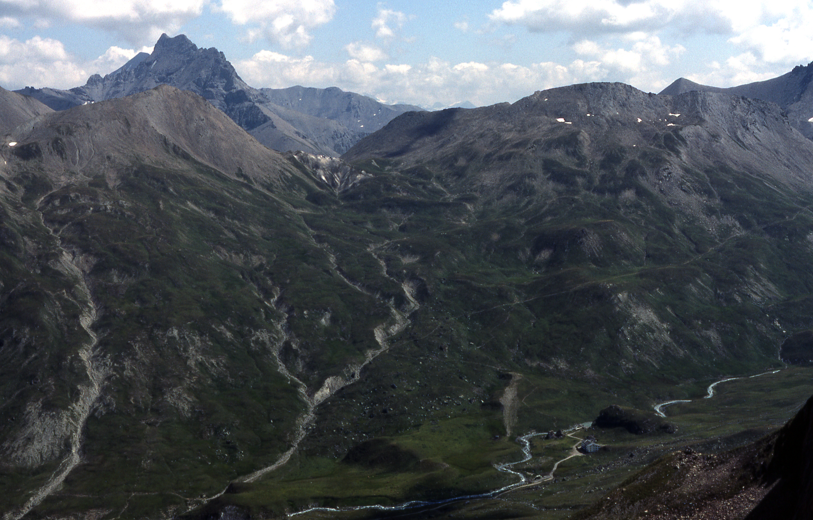 Heidelberger Hütte vom (Aufstieg zum) westlich gelegenen Ritzenjoch (2.687 m)Hauptgipfel, linker oberer Bildrand: Stammerspitze bzw. Stammerspitz bzw. Piz Tschütta (3.254 m),darunter im Vordergrund: Piz Davo Sassè (2.792 m),rechts davon nach dem Einschnitt: Ils Chalchogns (2.792 m; im Bild die höchte Erhebung auf dem Kamm, mit der pyramidenförmigen Spitze des 2.849 m hohen Piz Valpiglia rechts im Hintergrund)